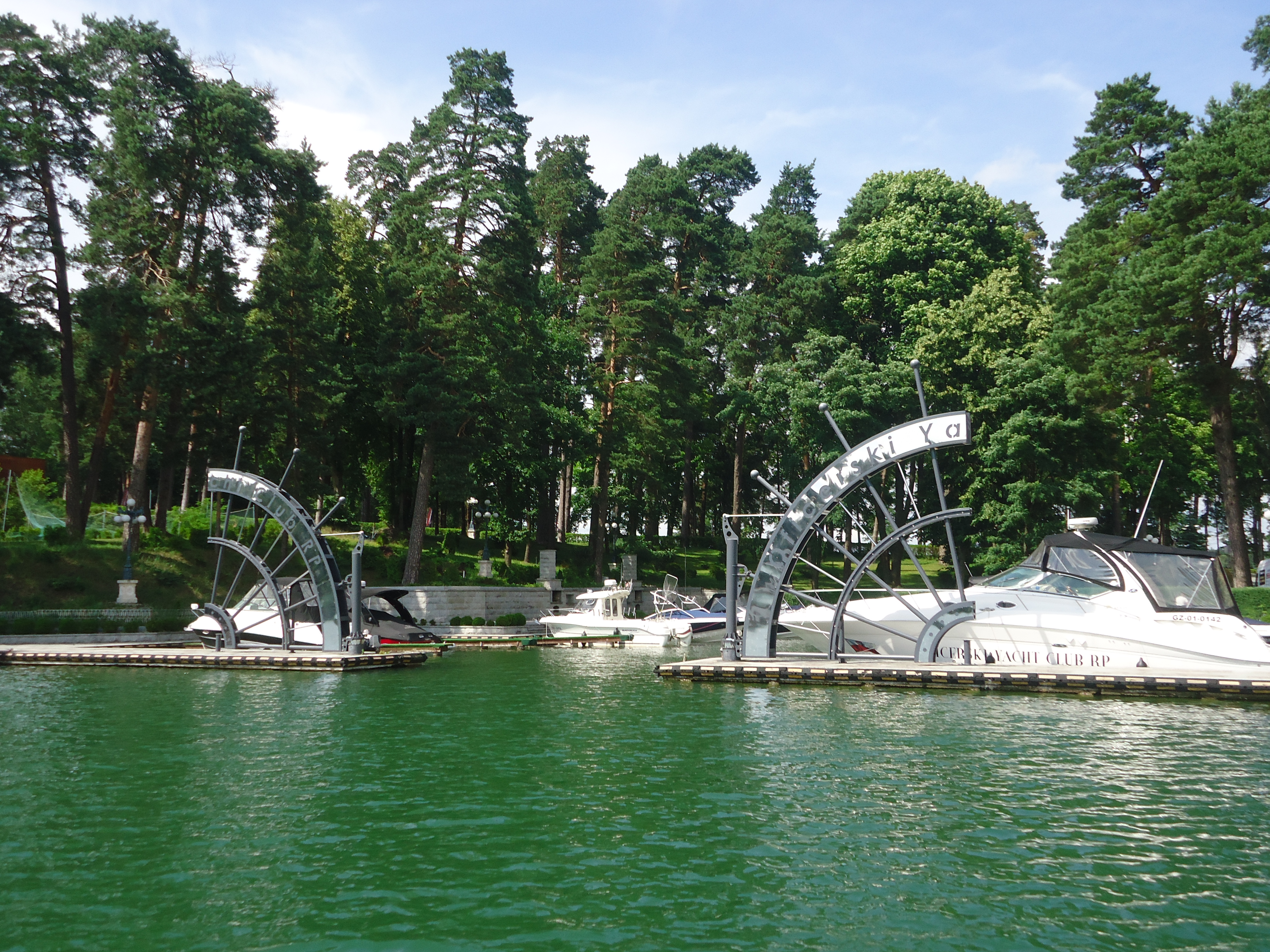 województwo podlaskie, Kanał Augustowski Wikidata has entry Q770907 with data related to this item.